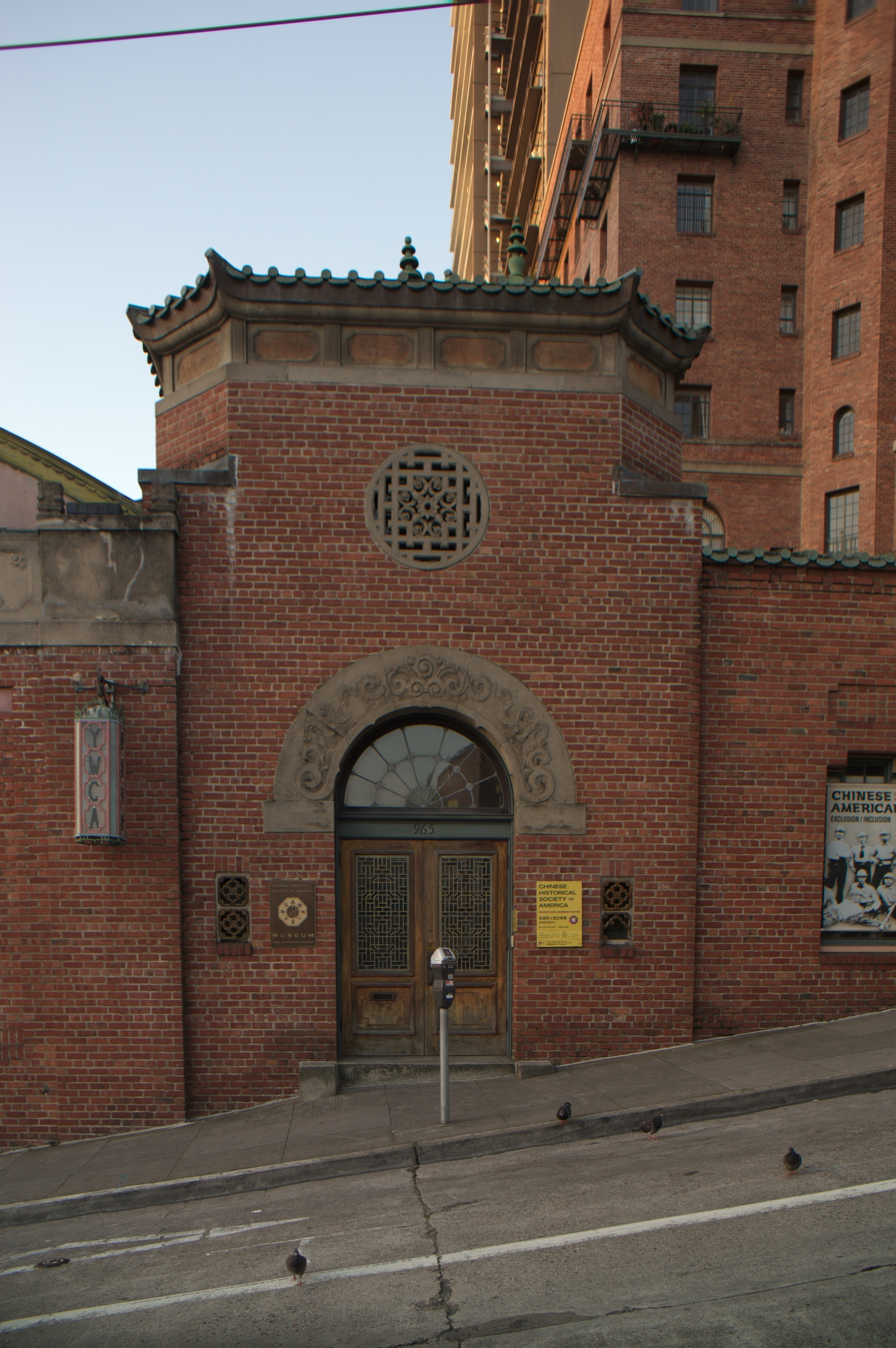 0146 YWCA